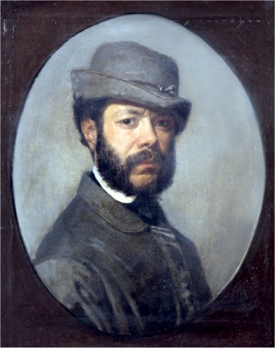 autoritratto di Filippo Palizzi (1860 circa) conservato alla Pinacoteca del Museo Civico di Vasto